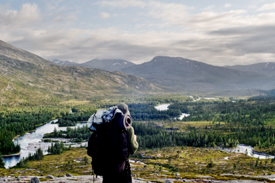 Utsikt over Lomsdalen.